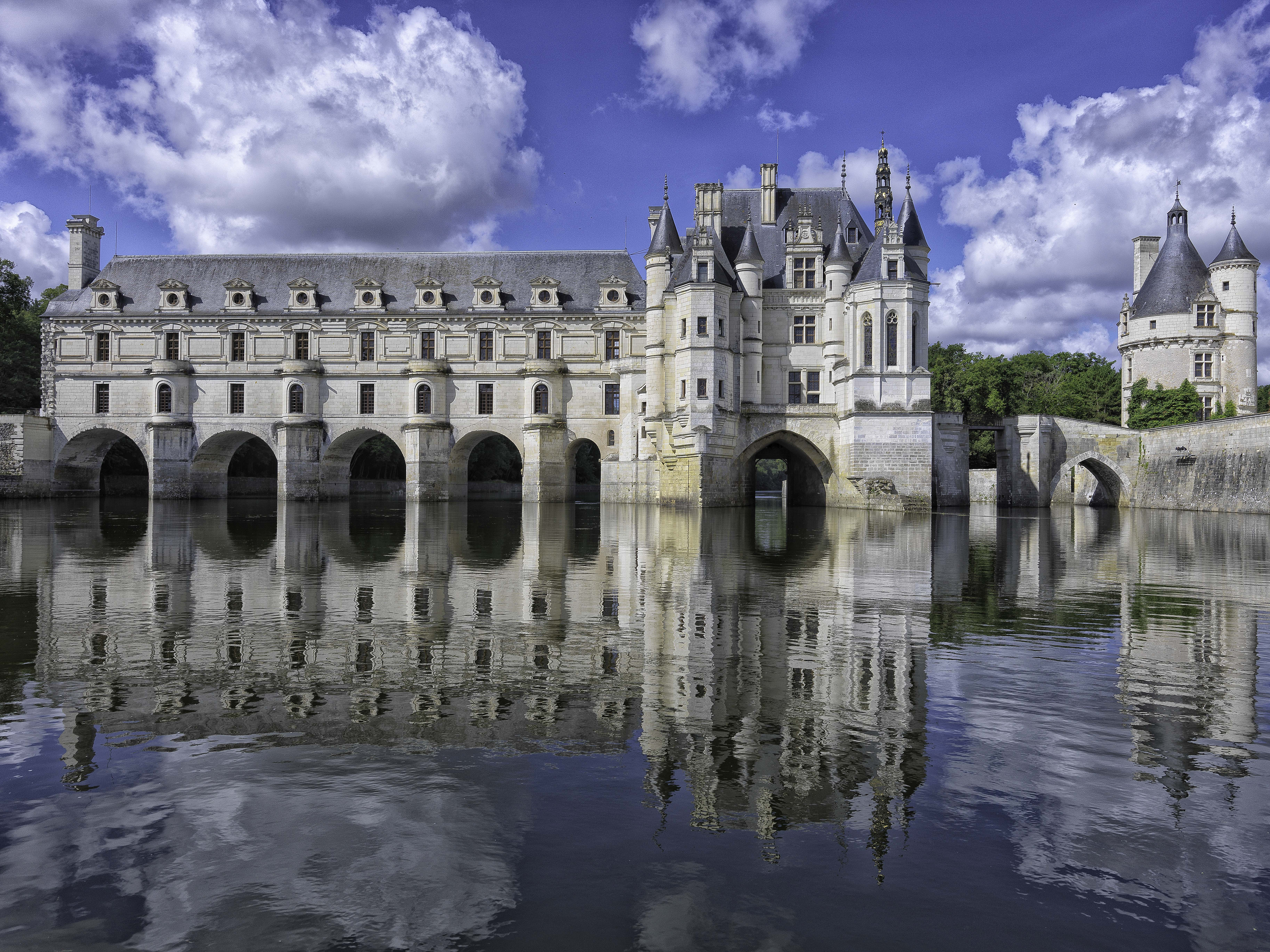 Château de Chenonceau - Photo réalisée avec un Hasselblad.